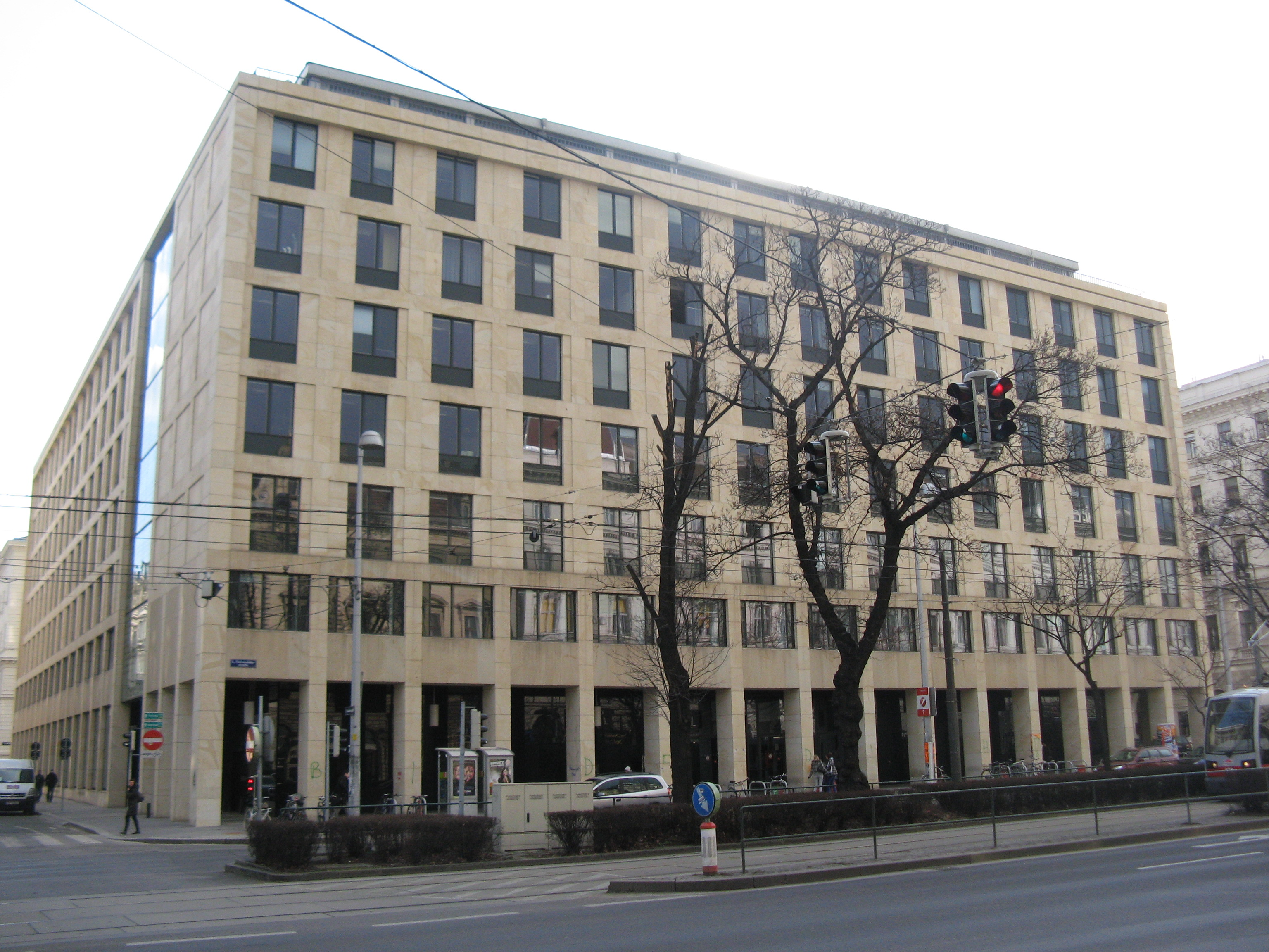 Neues Institutsgebäude der Universität Wien (1960-62) von Alfred Dreier und Otto Nobis, Universitätsstraße 7, Wien-Innere Stadt